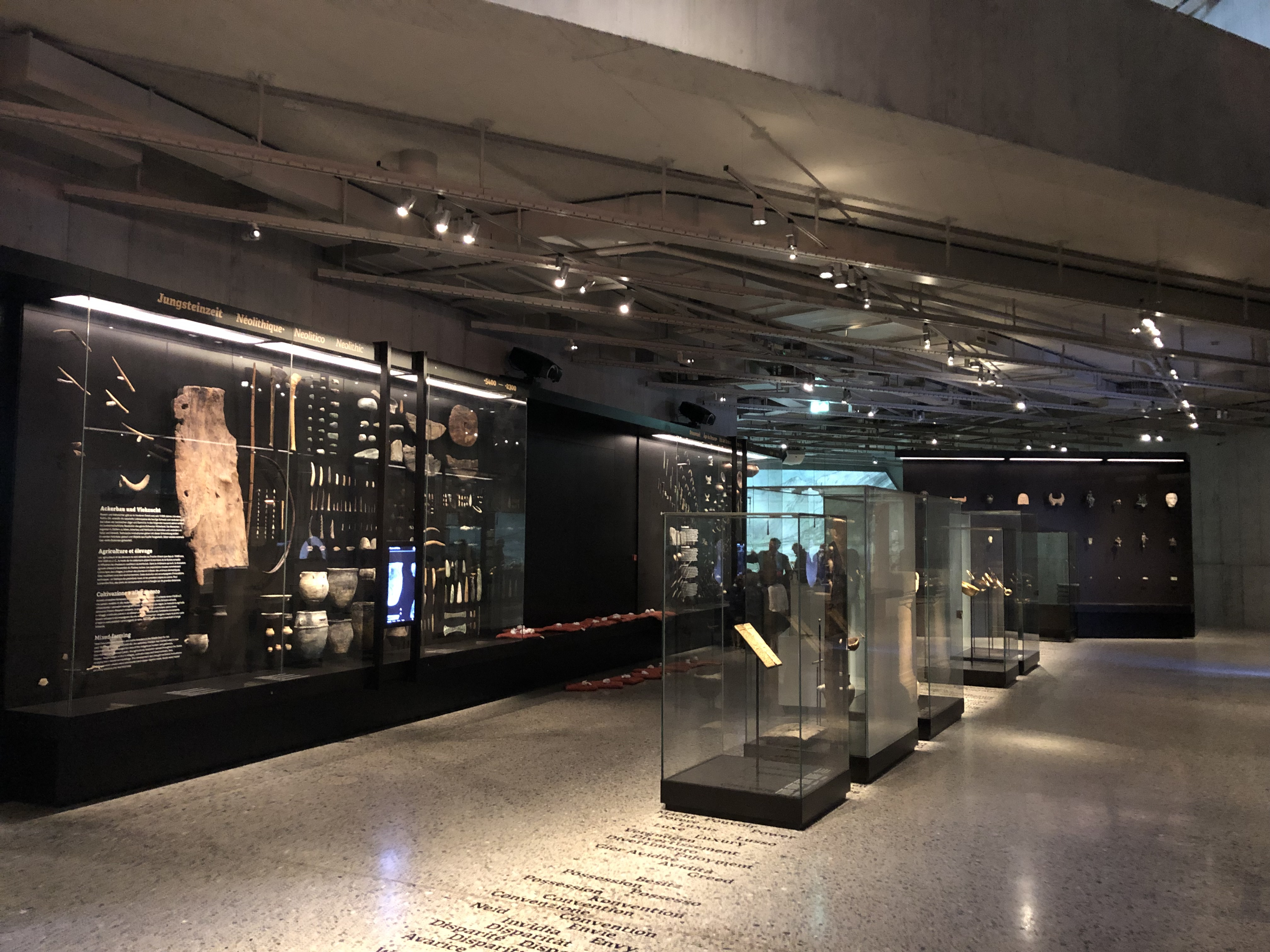 Schweizerisches Landesmuseum in Zürich, Ausstellung Archäologie